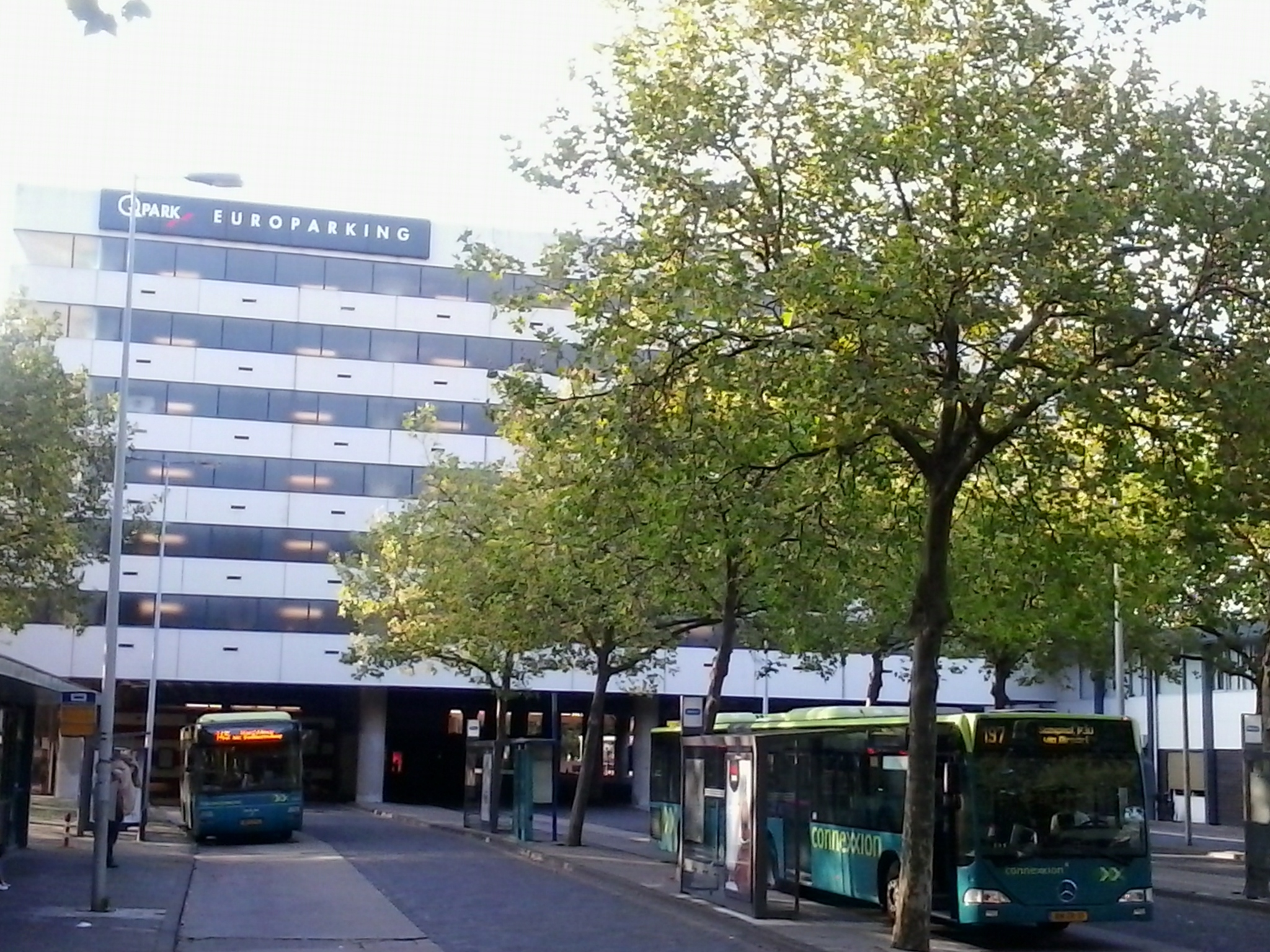 Het Busstation Marnixstraat en parkeergarage in Amsterdam in 2014, gezien vanaf de Elandsgracht. Linksvoor is nog een stukje te zien van het dienstgebouwtje (Elandsgracht 150) dat in 2015 werd gesloopt. Waar op de foto de bussen staan, ligt nu een grindveld. De bushaltes liggen sinds de zomer van 2015 meer naar rechts en naar achter.